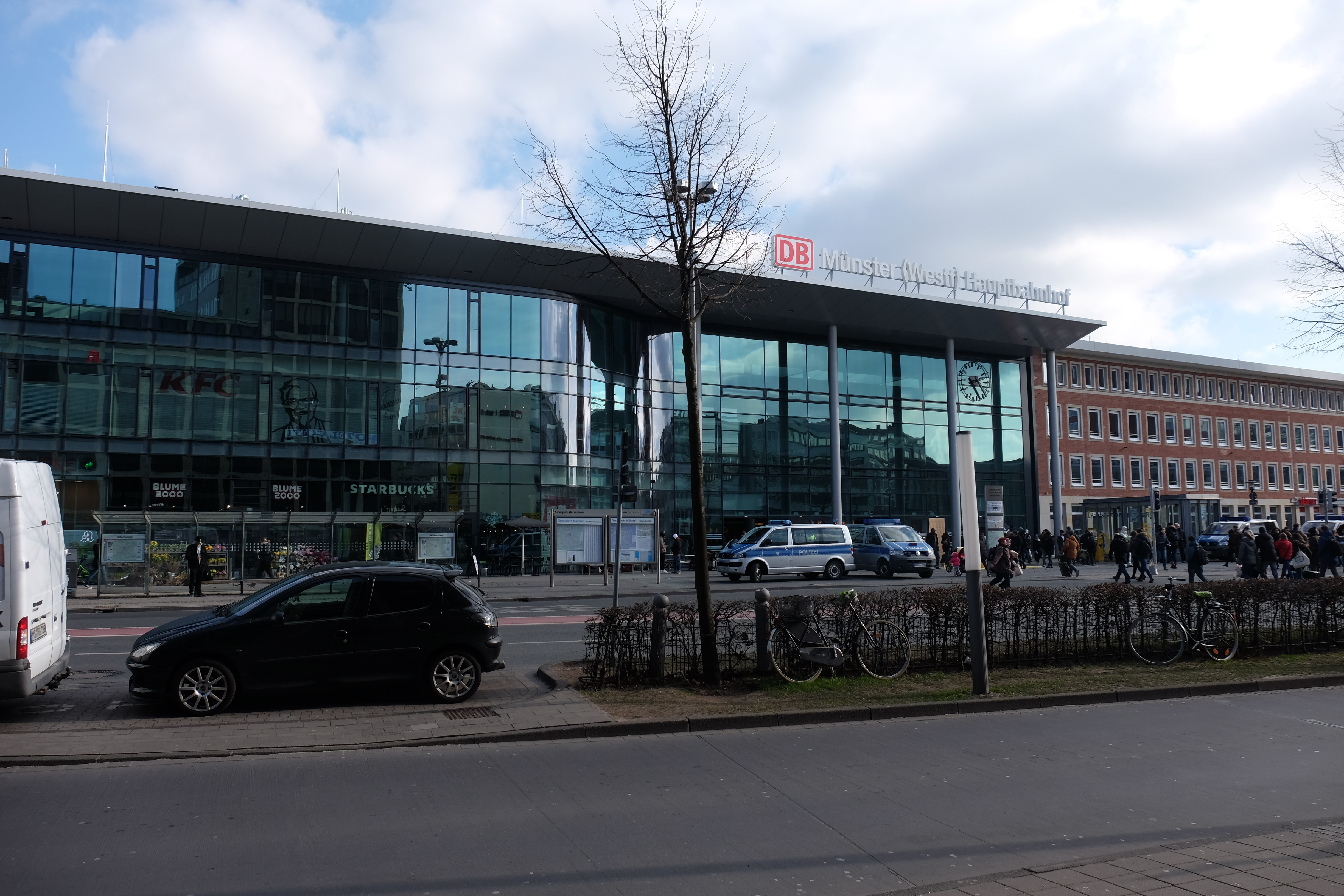 Rundgang in Münster 2018